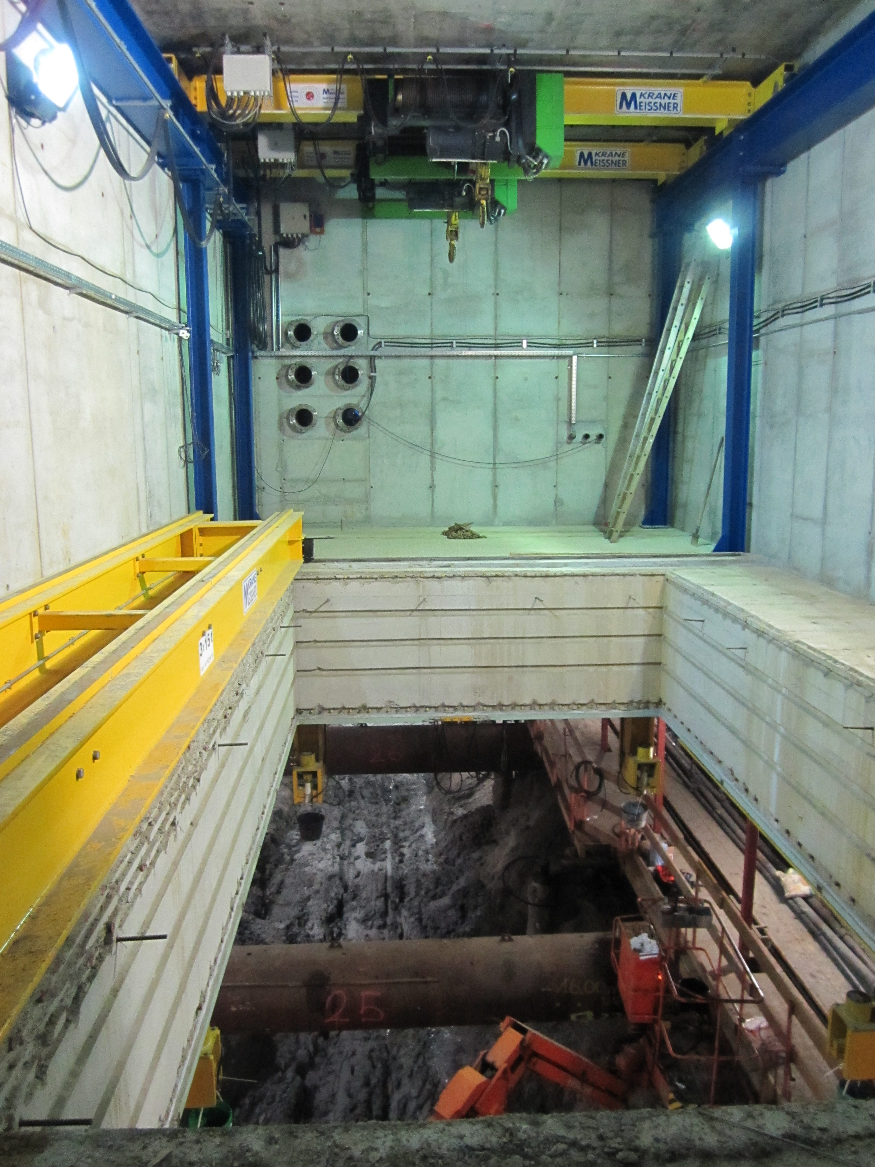 Speciale sluis in het Amsterdamse metrostation Vijzelgracht van de Noord/Zuidlijn, bestemd voor het onder hoge druk afgraven van de laatste meters grond